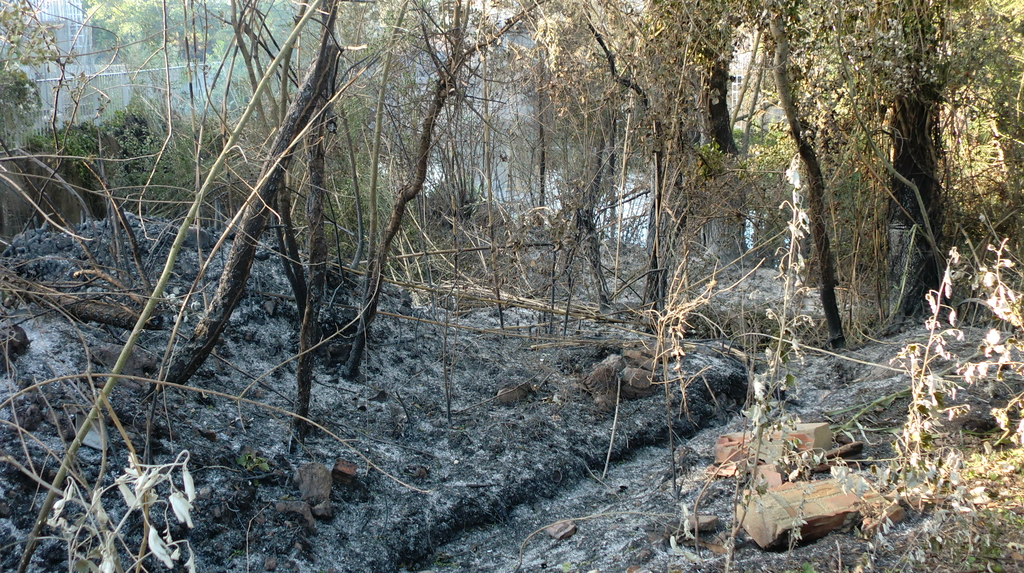 El foc va travessar el riu Muga, al terme municipal de Pont de Molins. Imatge d'avui al matí. Horts cremats, arbres caiguts.